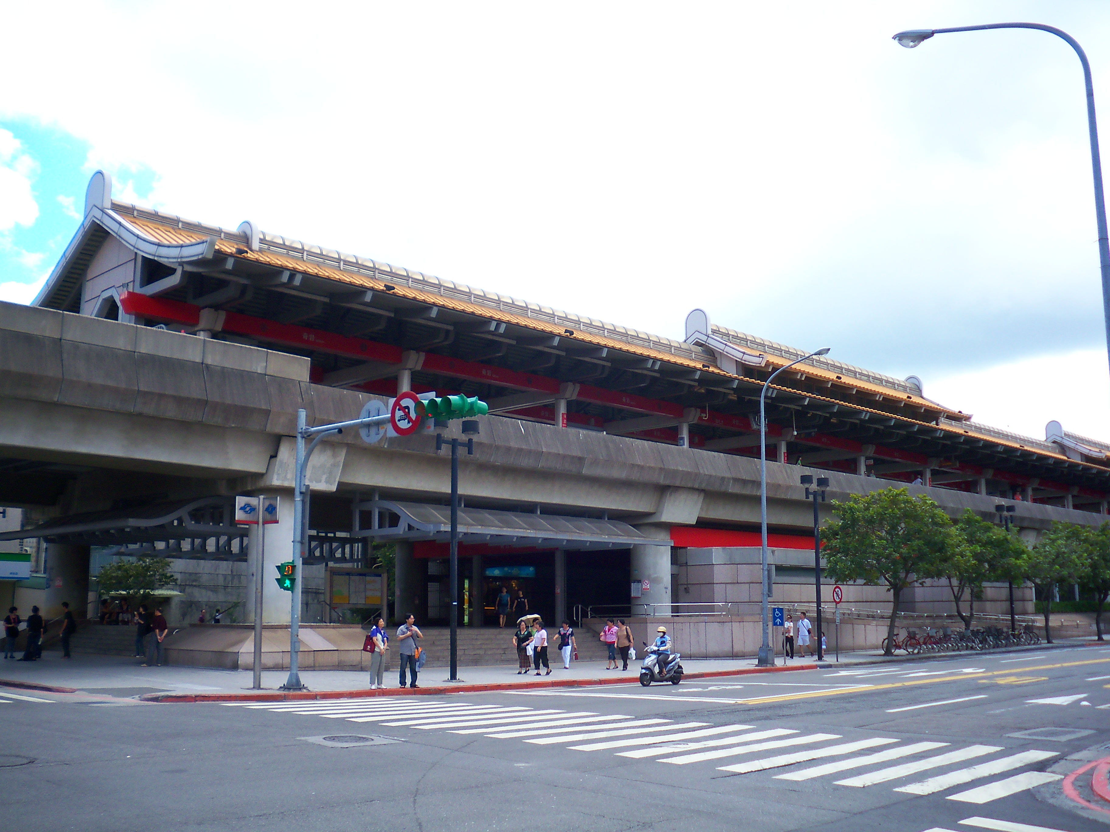 台北捷運淡水線奇岩駅駅舎。